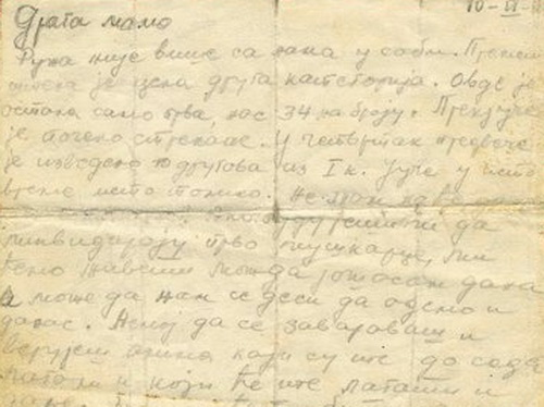 Srpskohrvatski / српскохрватски: Pismo sestara Srbijanke i Jovanke Bukumirović iz banjičkog logora, 10. juna 1944.